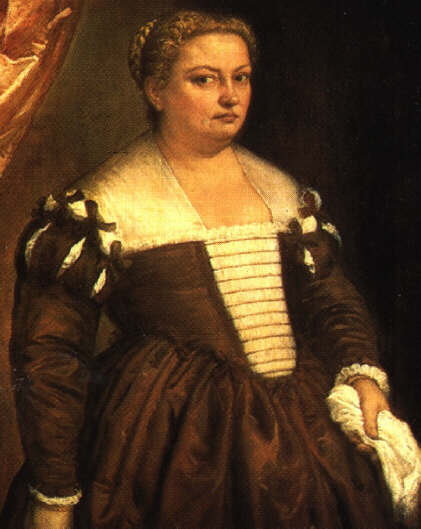 Venetian Lady